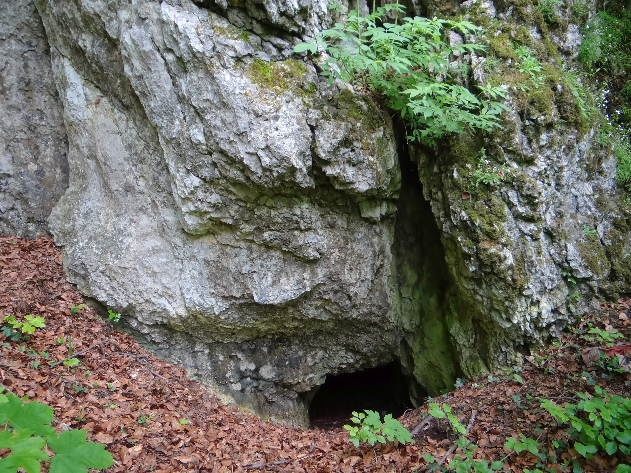 Jaskinia Szklana w Szklarach (w Bukowej Górze). otwór wschodni